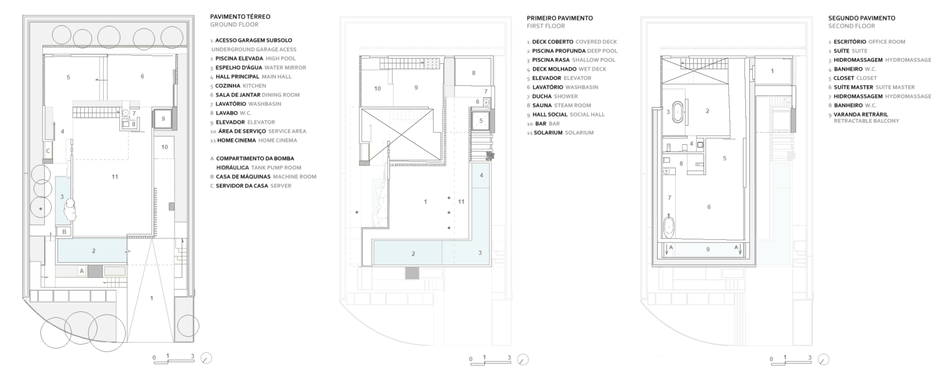 Projeto executivo